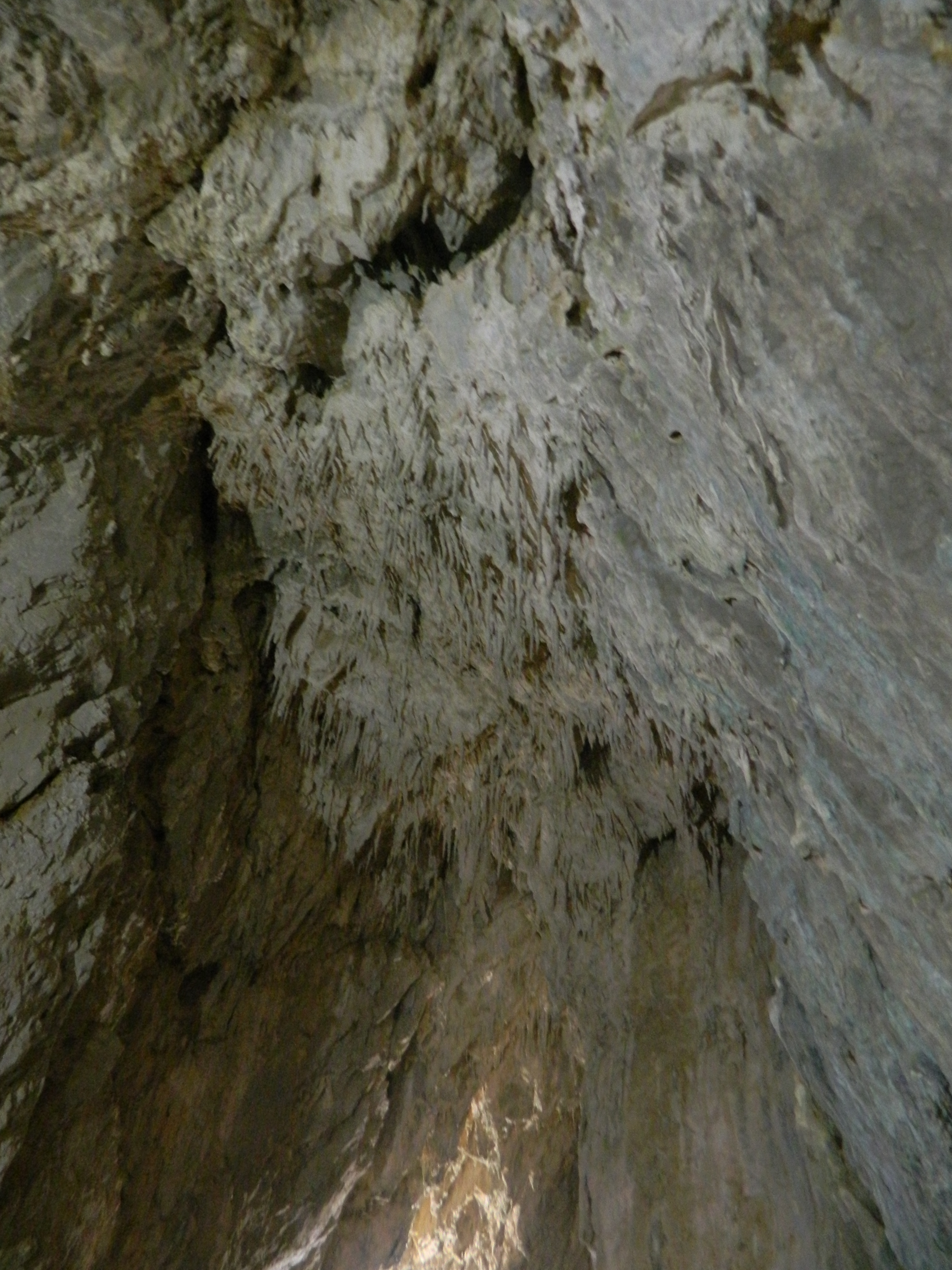 Ово је фотографија заштићеног природног добра у Србији под шифром: СП225 This is a a photo of a natural area in Serbia with ID: СП225 - Таваница